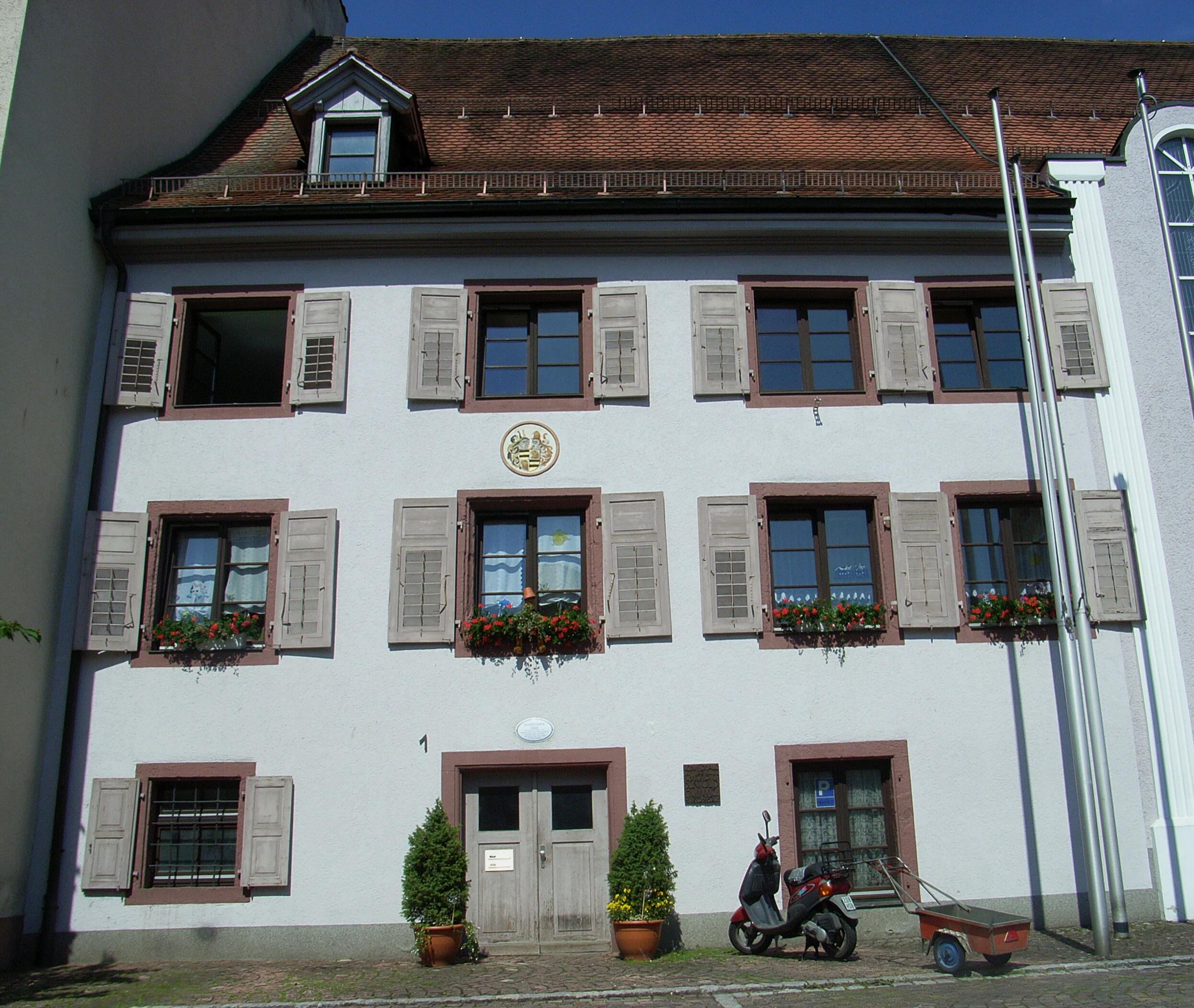 Dieses Bild zeigt das Geburtshaus von Bertold Hummel in Hüfingen.